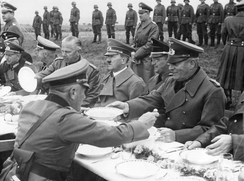 Zentralbild Nach der Okkupation des Sudetenlandes durch die deutschen Faschisten vom 1. bis 7. Oktober 1938. UBz.: Adolf Hitler auf der Fahrt nach dem durch deutsche Truppen besetzten Eger bei einer Imbiss-Pause auf der Straße zwischen Franzensbad und Eger am 3.10.1938. von rechts: General Wilhelm Keitel, Konrad Henlein, Adolf Hitler, General Walter von Reichenau, Reichsführer-SS Heinrich Himmler und General Heinz Guderian. 13018-38